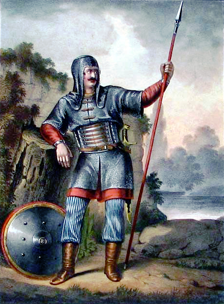 Русское вооружение с XIV до второй половины XVII столетия. Ратник в юшмане и в мисюрке. (48Х38см. Литография, раскрас акварелью, современный изданию. Составляли Чернихов и Разумихин. Рисовал на камне Белоусов.)